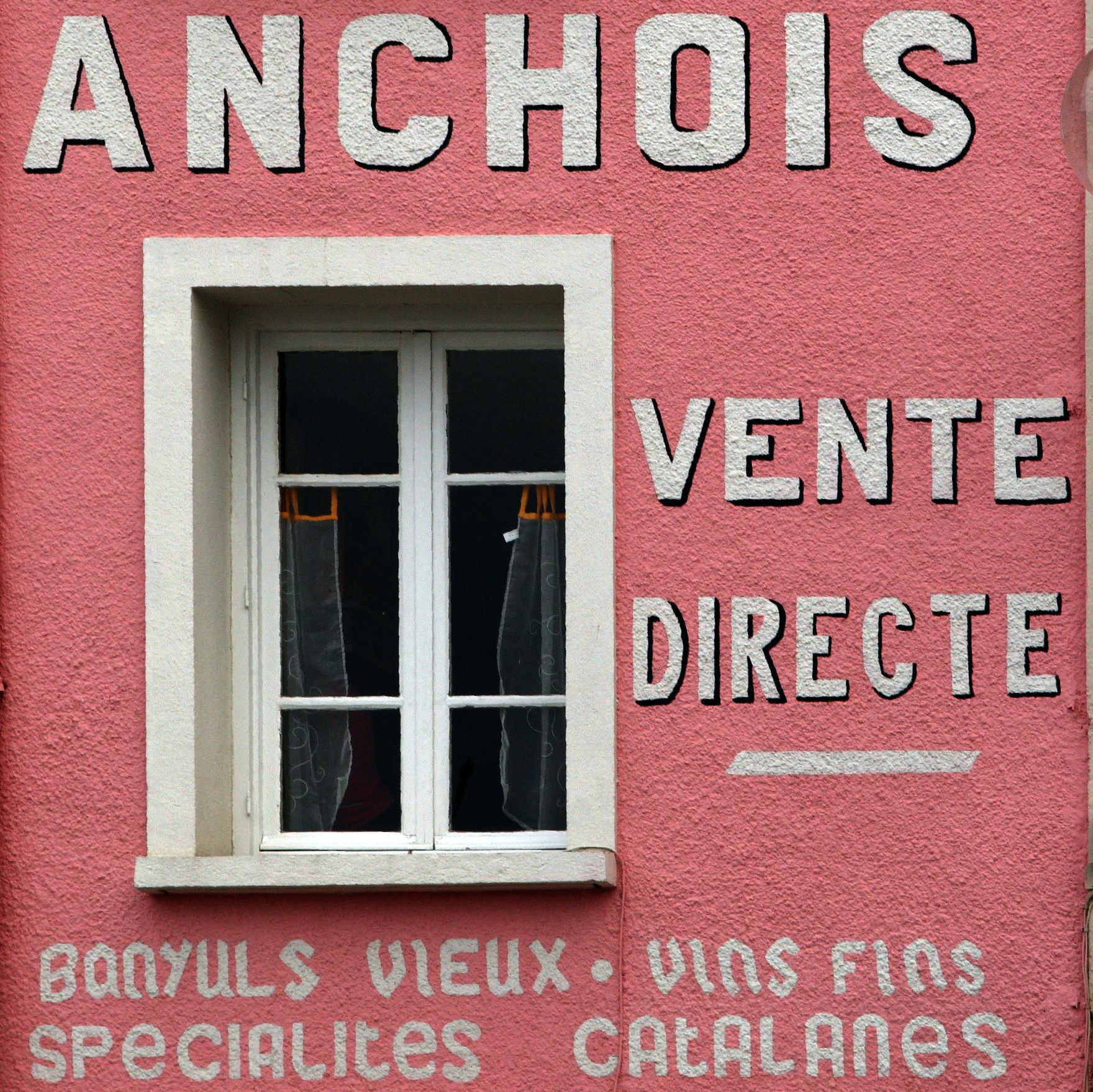 Publicité pour des anchois sur la façade d'une maison à Collioure, France.